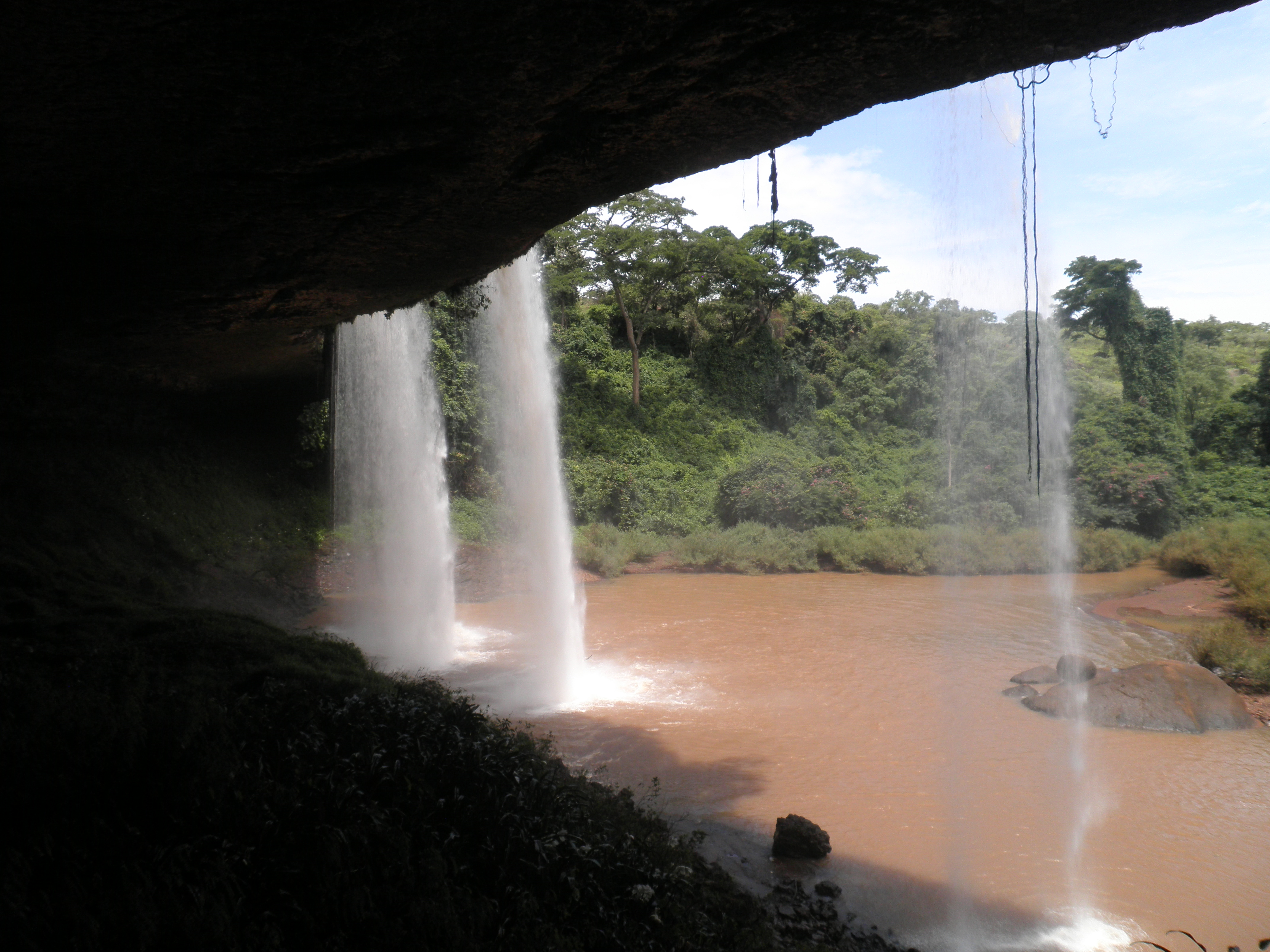 La chutes de Tello située à 50Km de Ngaoundéré dans la région de l'Adamaoua